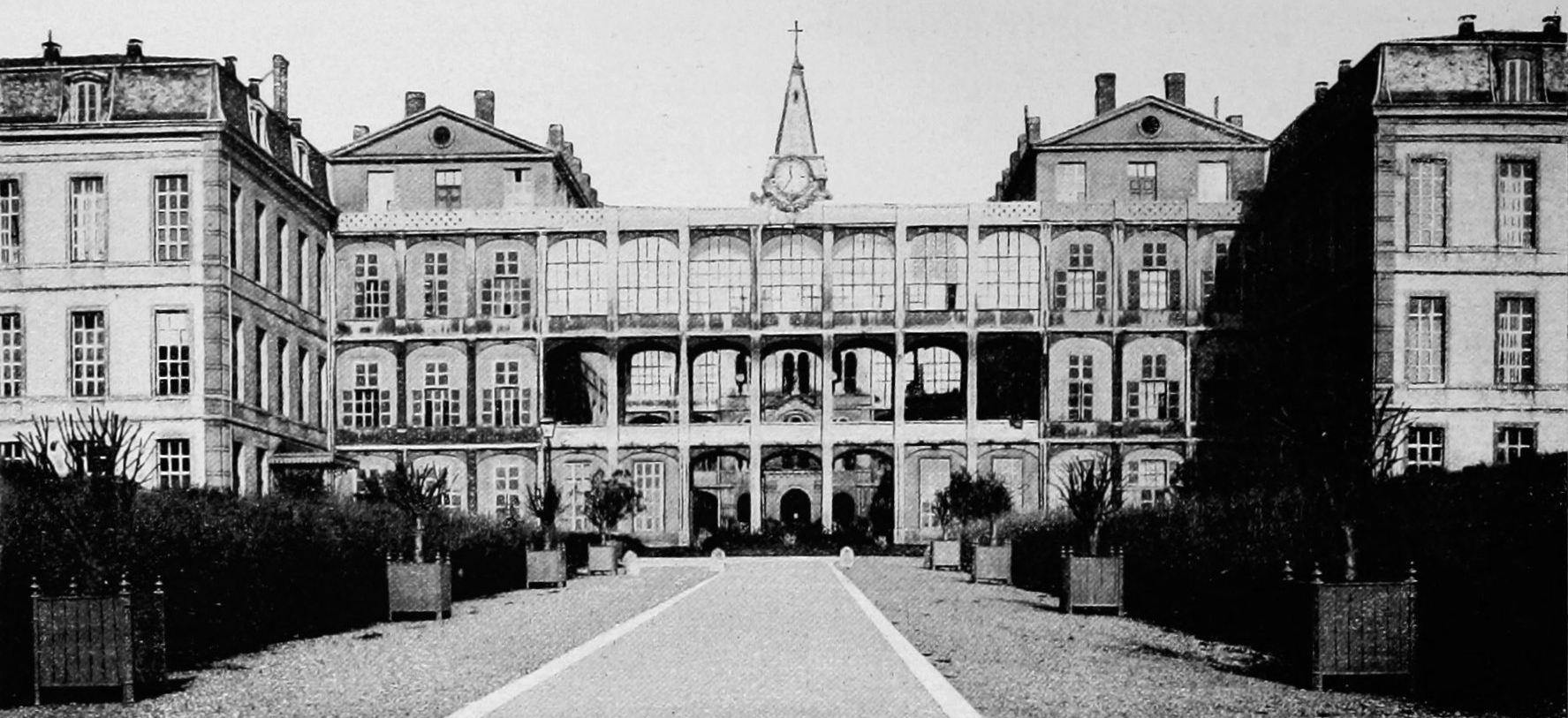 Dictionnaire illustré des communes du département du Rhône. Tome 2 / par MM. E. de Rolland et D. Clouzet.